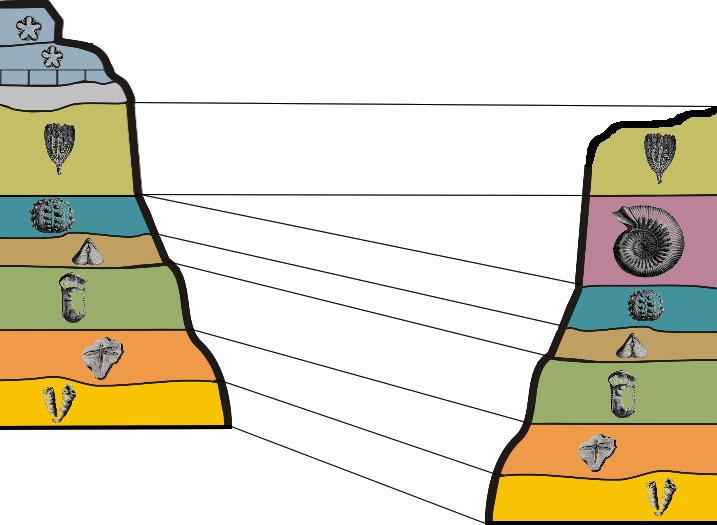 רצף פאונה